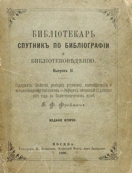 Брошюра московского библиографа Вильгельма Федоровича Фреймана "Библиотекарь". Спутник по библиографии и библиотековедению. Реферат, читаннный 13 декабря 1889 года в Политехническом музее. Вып. II. 2-е изд. М.: Тип. И. Васильева, 1890.